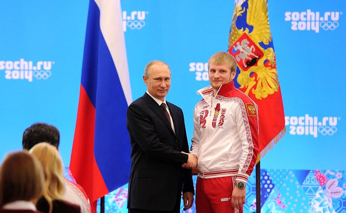 Медалью ордена «За заслуги перед Отечеством» первой степени награждён серебряный призёр Олимпийских игр в санном спорте Владислав Антонов.